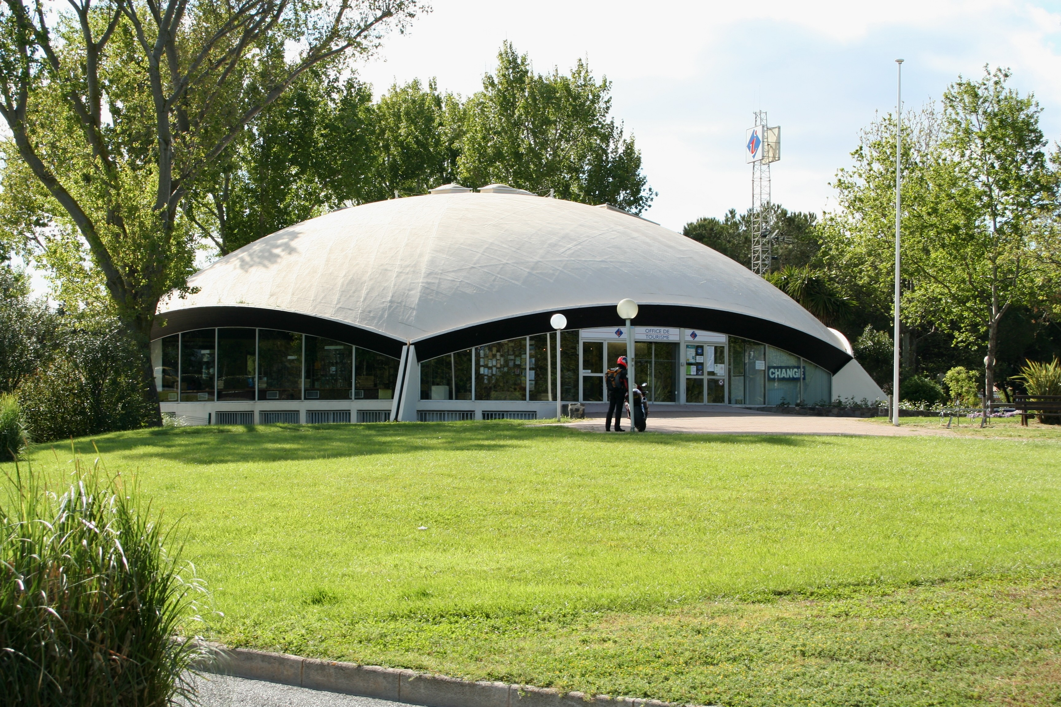 Bulle d'accueil de l'office de tourisme au Cap d'Agde, Hérault